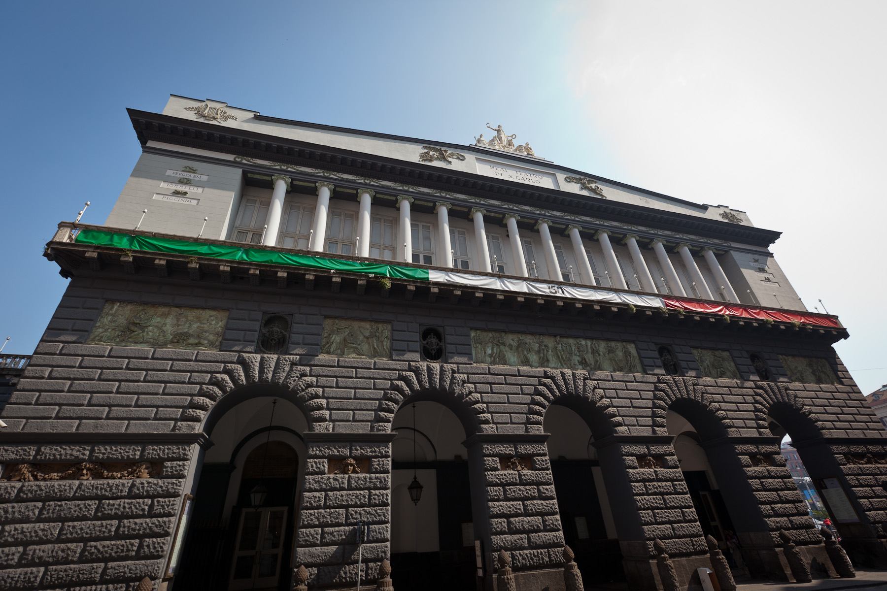 Facciata del San Carlo di Napoli al 150a anniversario dell'unità d'Italia.